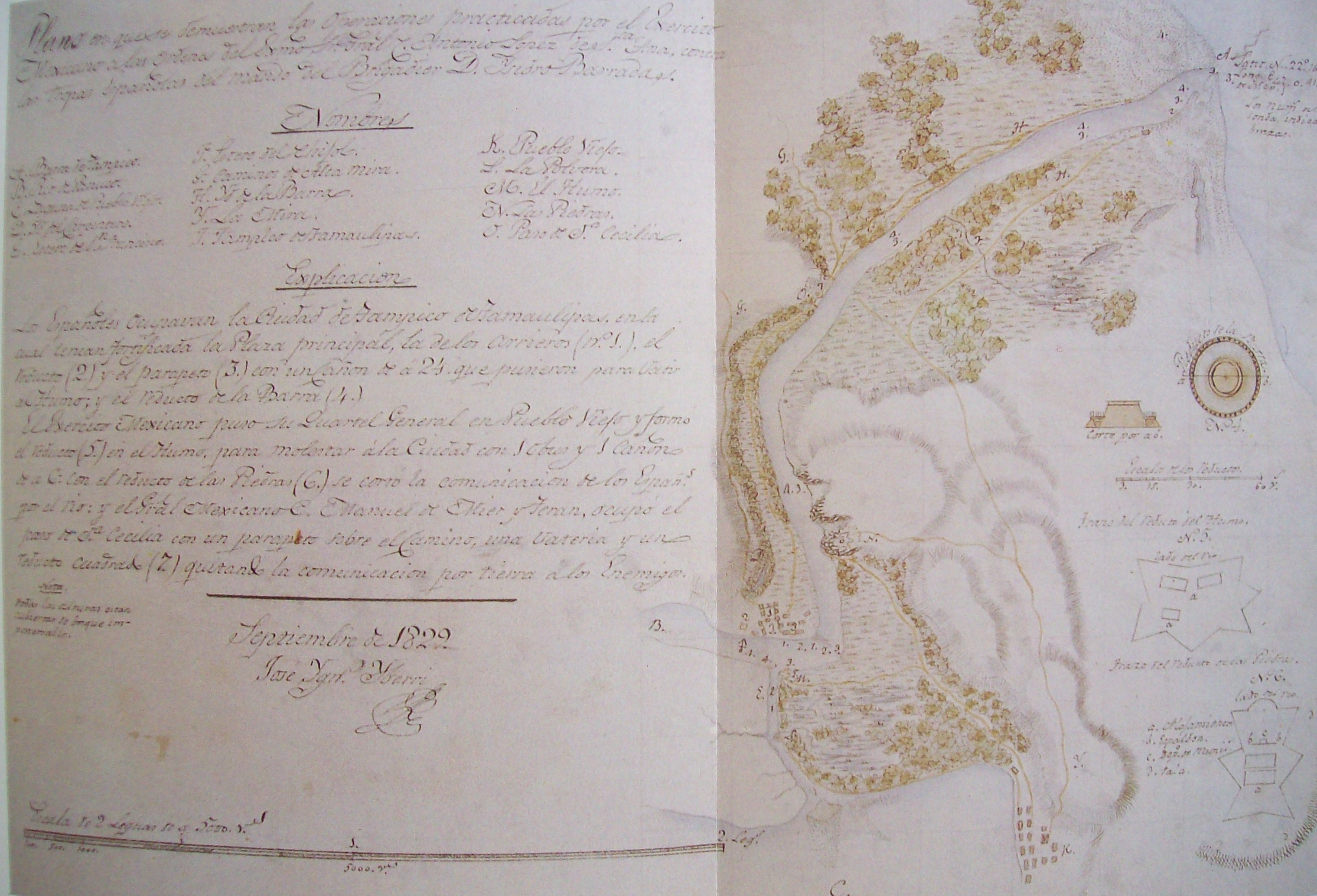 Plano en que se demuestran las operaciones practicadas por el Ejército Mexicano a las órdenes del Exmo. Sr. Gral. Antonio López de Santa Anna contra las tropas españolas al mando del Brigadier D. Isidro Barradas, 1829. Tinta y acuarela sobre papel.